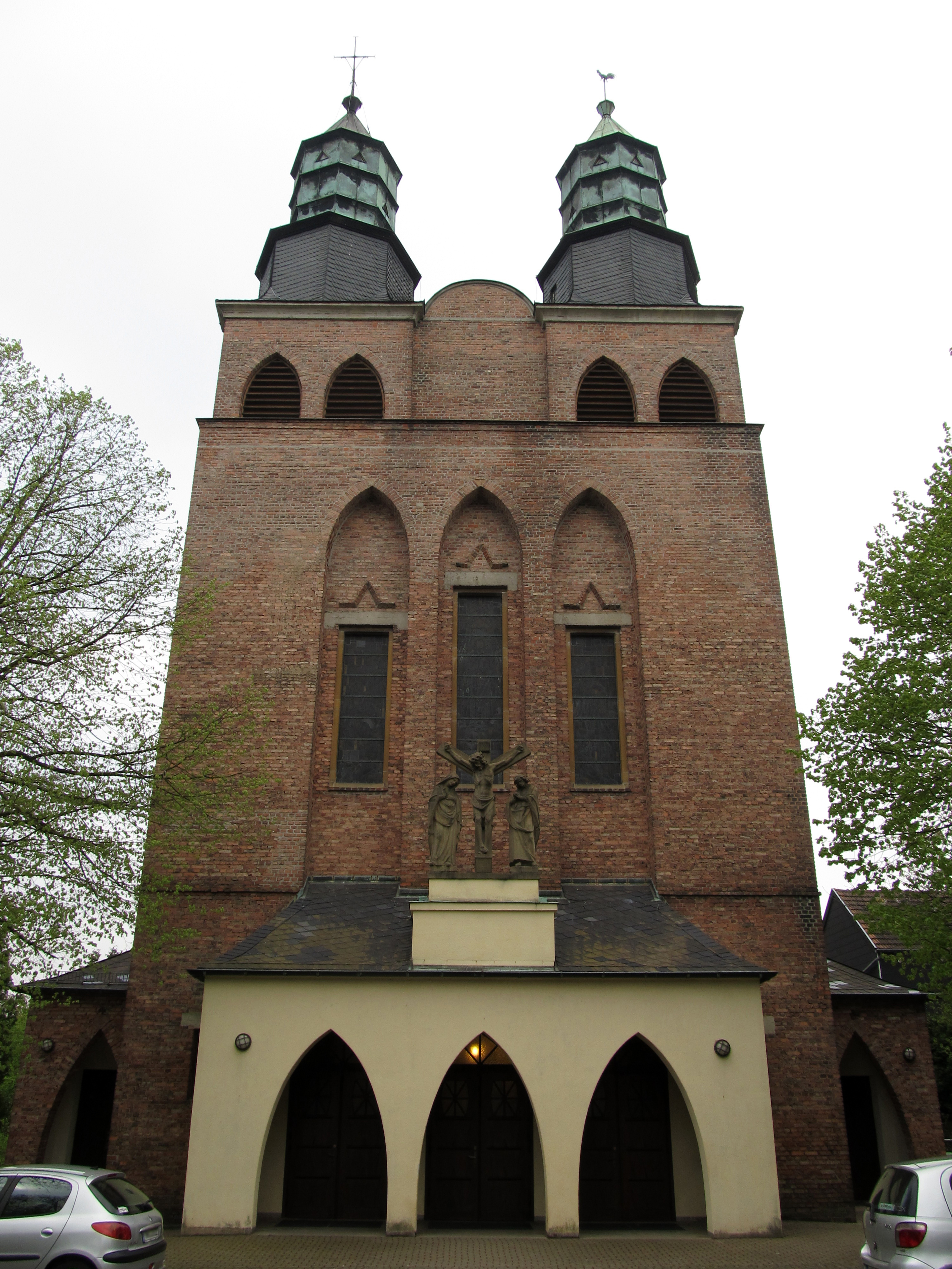 Die katholische Pfarrkirche St. Laurentius in Heiligenwald, einem Ortsteil der Gemeinde Schiffweiler, Landkreis Neunkirchen, Saarland